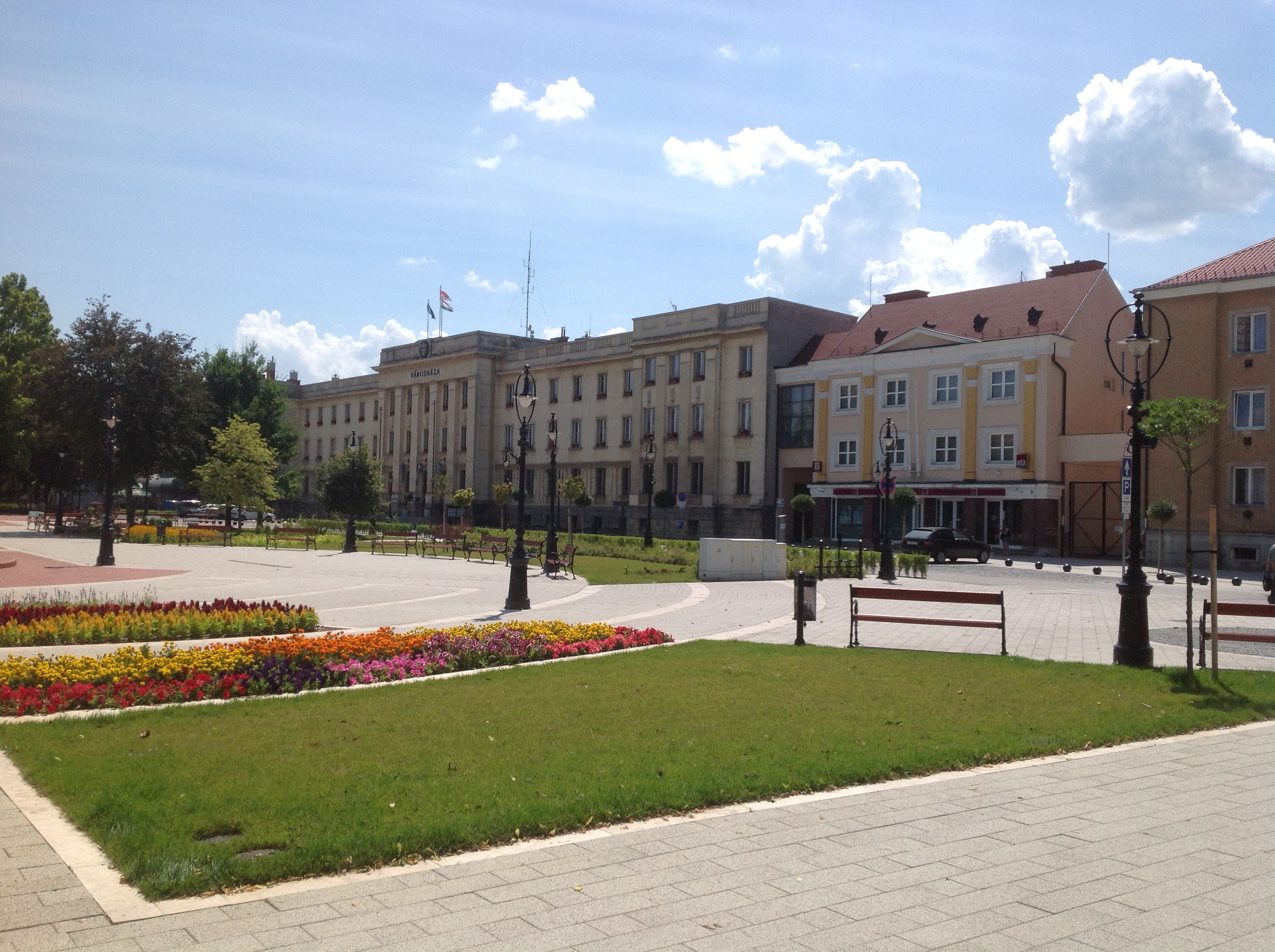 Polgármesteri Hivatal Nagykanizsa Városháza. - Cím: Nagykanizsa, Erzsébet tér 7